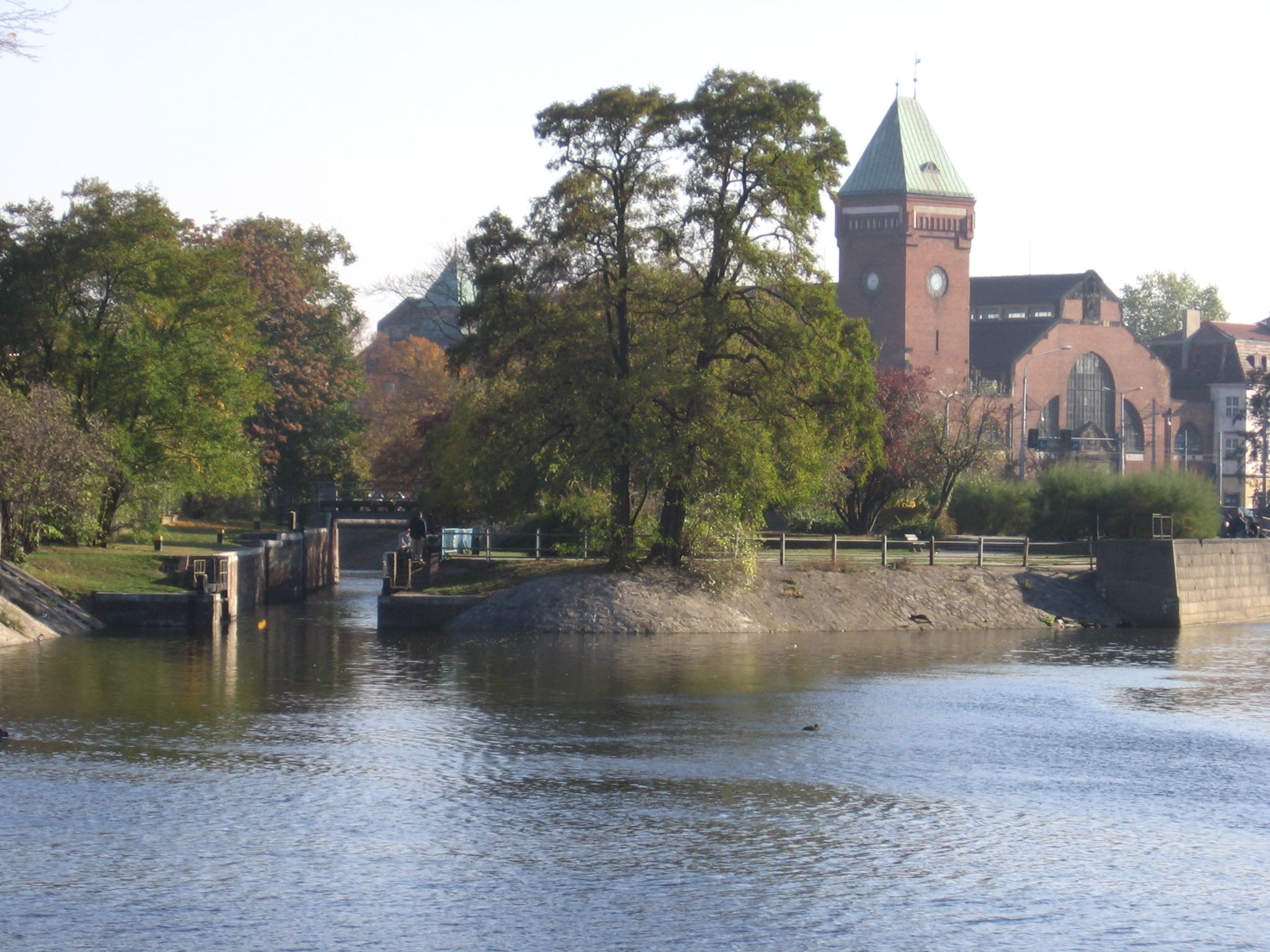 Wrocław, Poland "Sand" Water Gate (Śluza Piaskowa), view from Słodowa Island